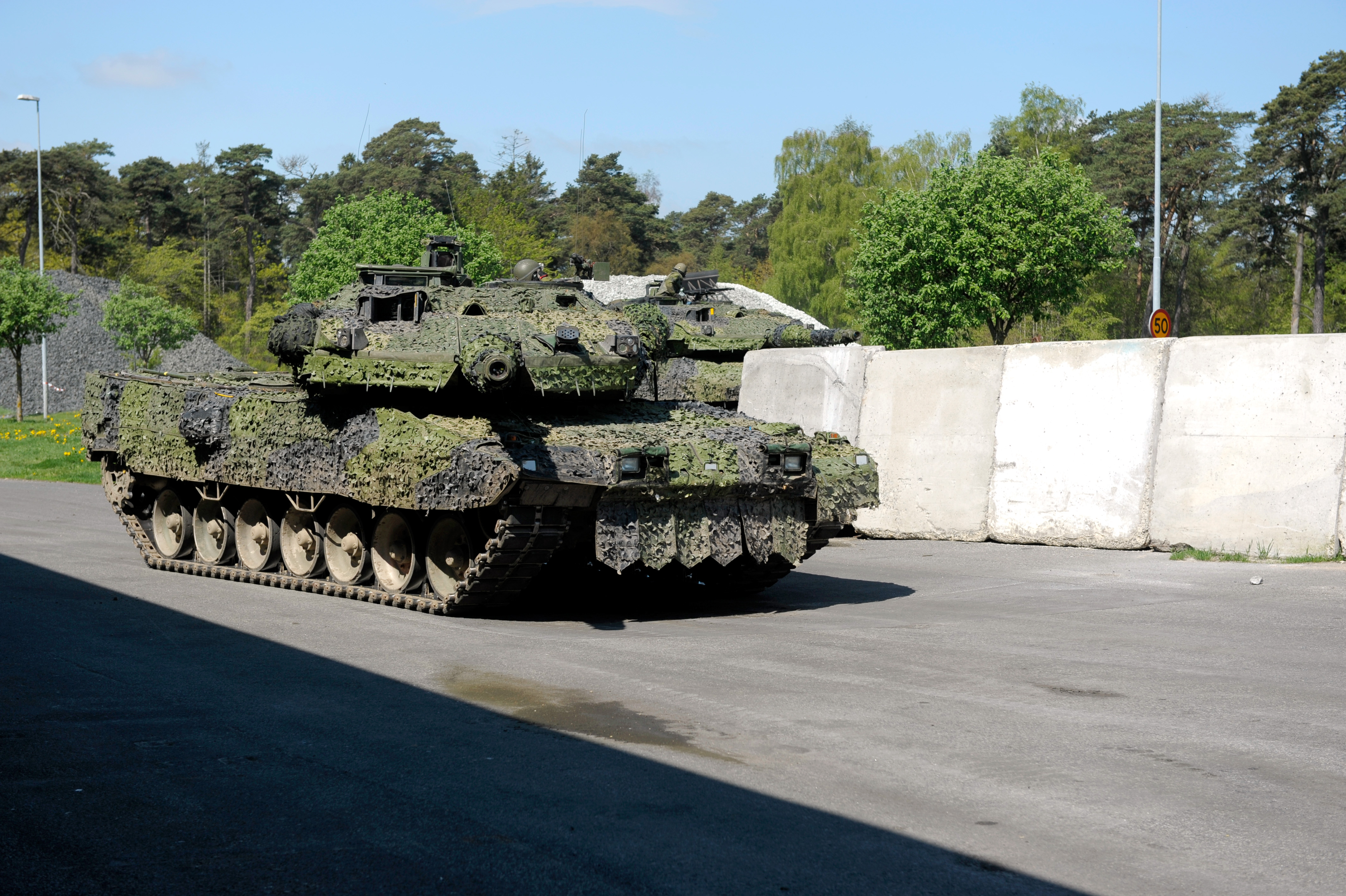 Militärövning Joint Challenge i Åhus hamn, Sverige.